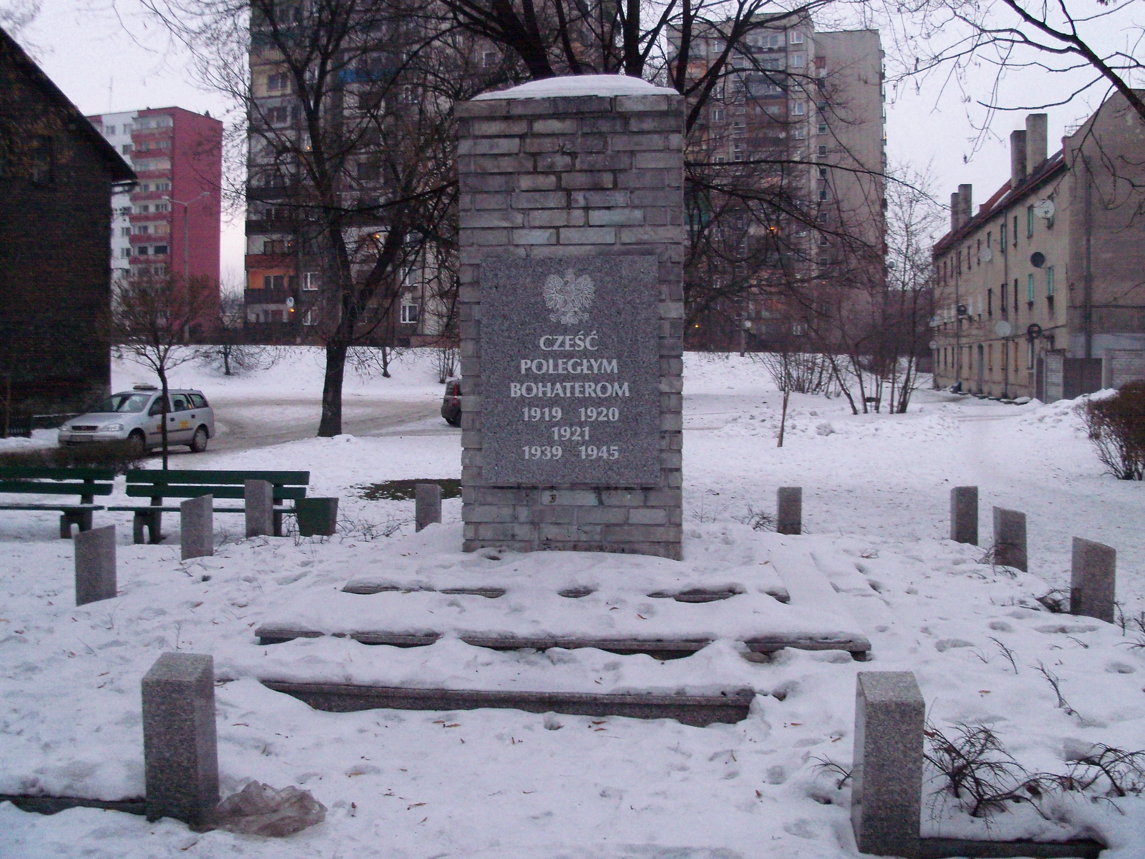 pomnik poległych w czasie Powstań Śląskich i w czasie II wojny światowej; pomnik znajduje się na placu Wincentego Wajdy w Katowicach-Bogucicach